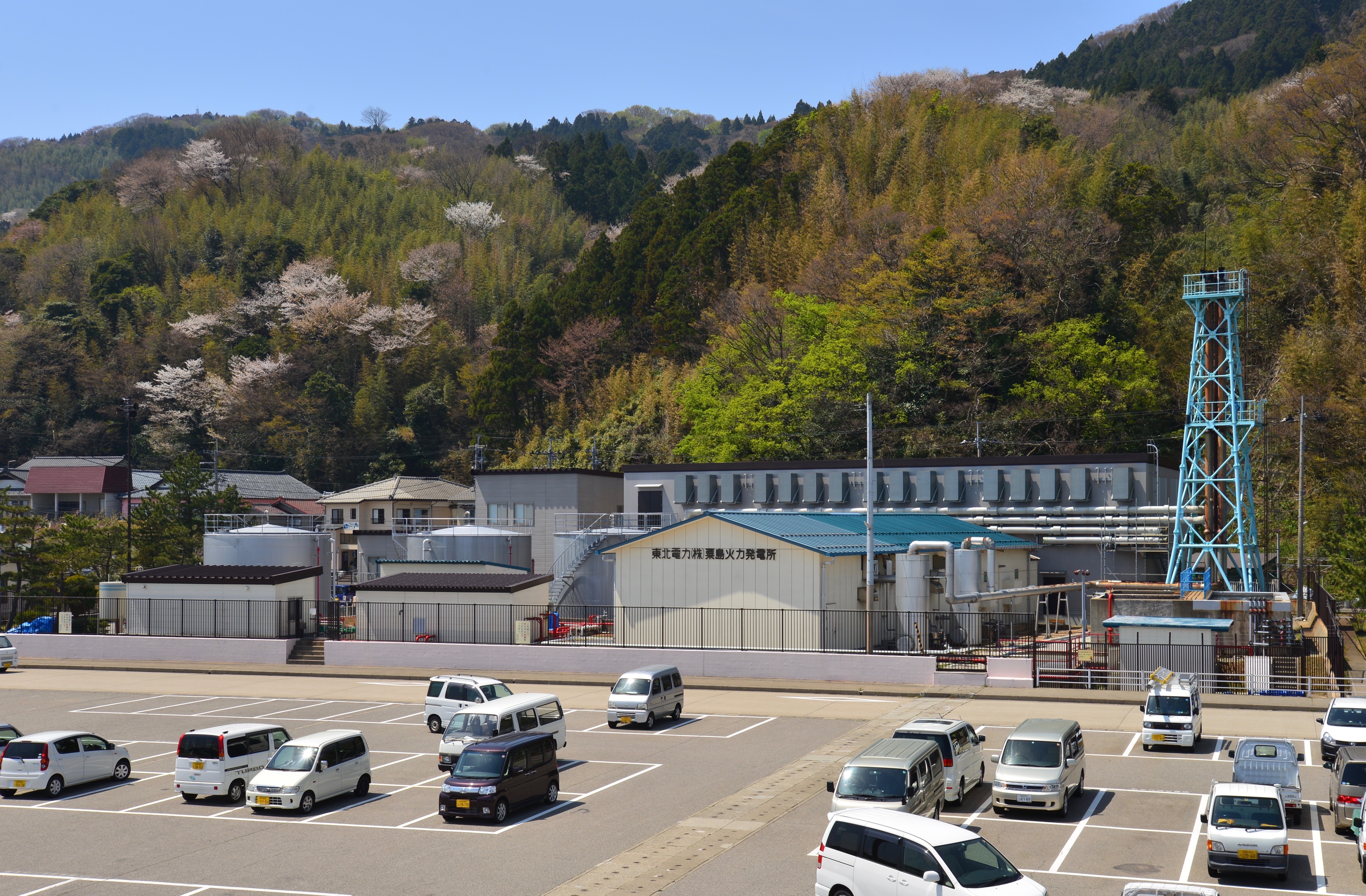 東北電力粟島火力発電所